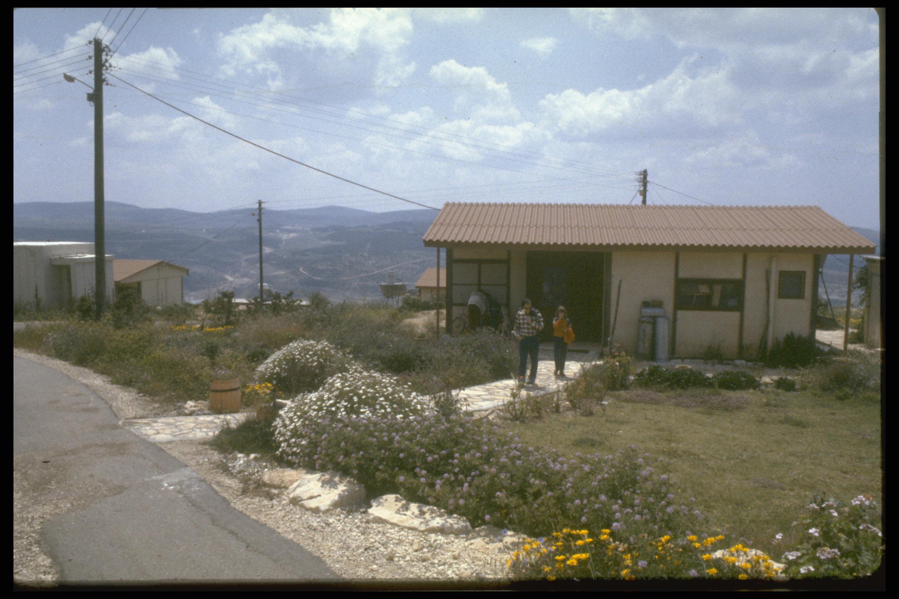 Mitzpe Tzurit in the Galilee. יישוב מצפה צורית שבגליל Photo: HARNIK NATI, 04/23/1984